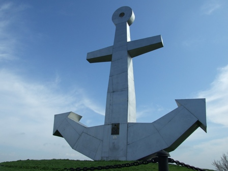 Матвеево-Курганский район